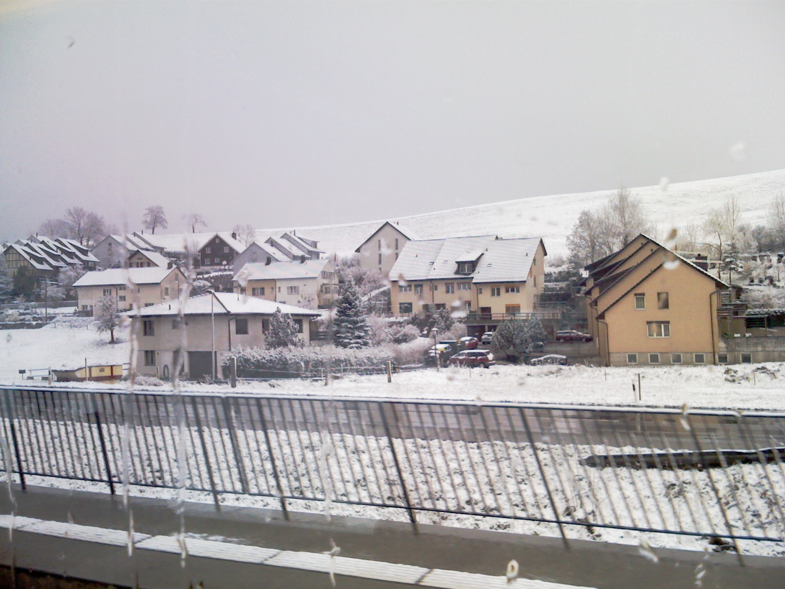 Schottikon, Canton Zurich, Switzerland - Schottikon, Kantono Zuriko, Svislando